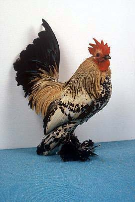 eigen foto